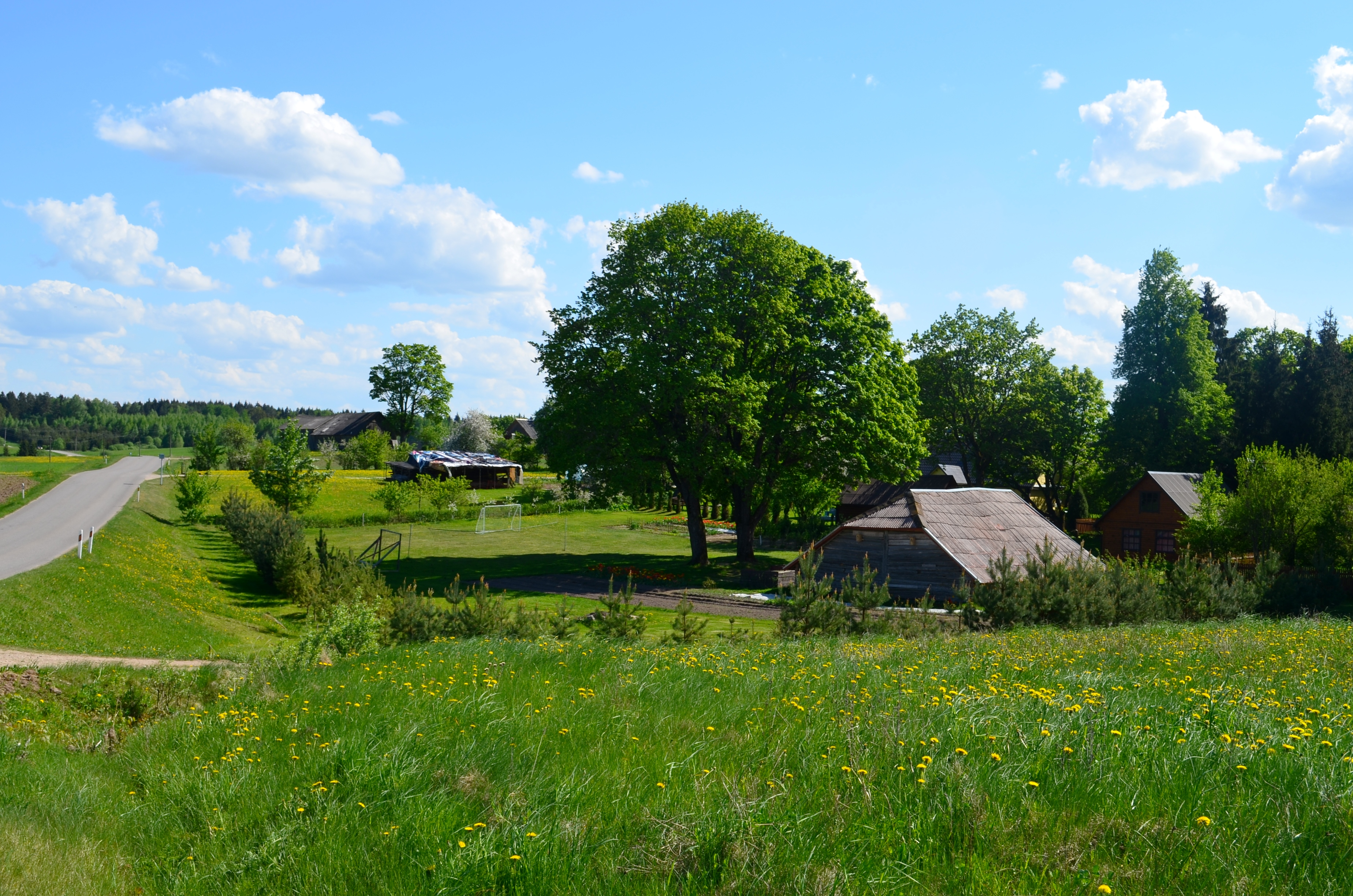 Gilužiai, Balninkų sen., Molėtų raj.